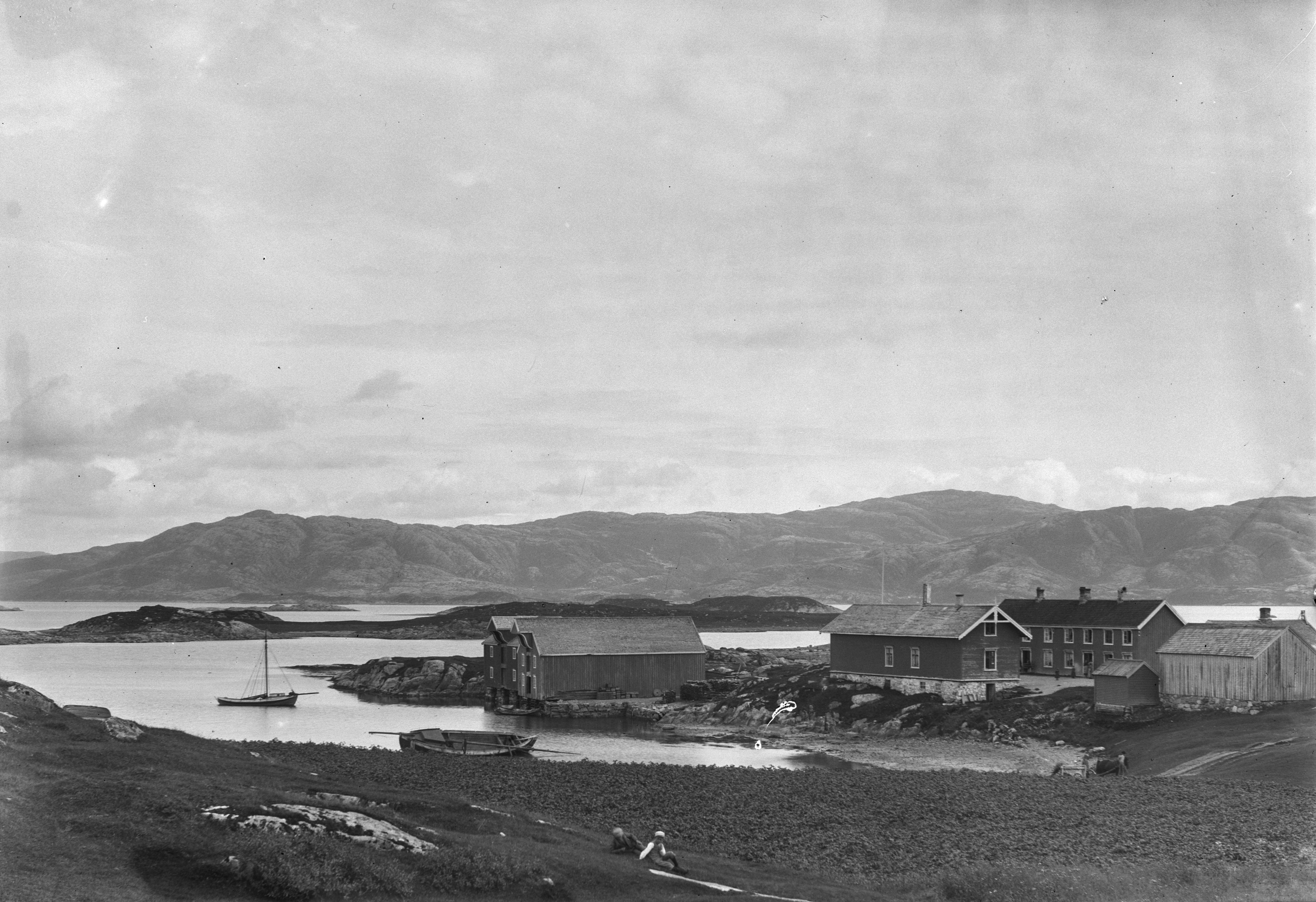 Landskap ved handelsstedet Løvøyvågen (Nesset og Falkmoen) i Vikna.